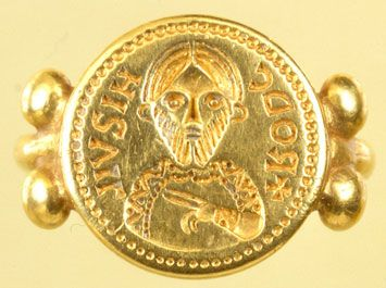 Sigillo longobardo, premio della Regione Lombardia (1997)